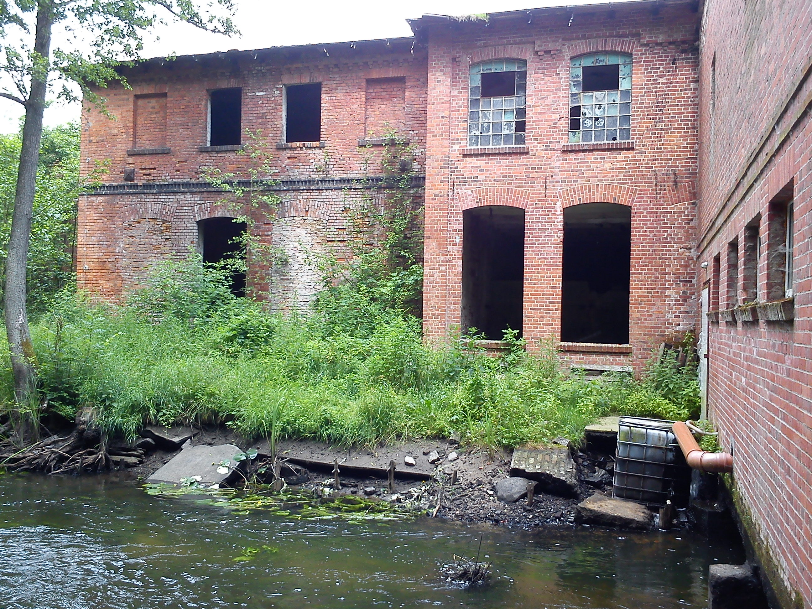 Koziczyn.